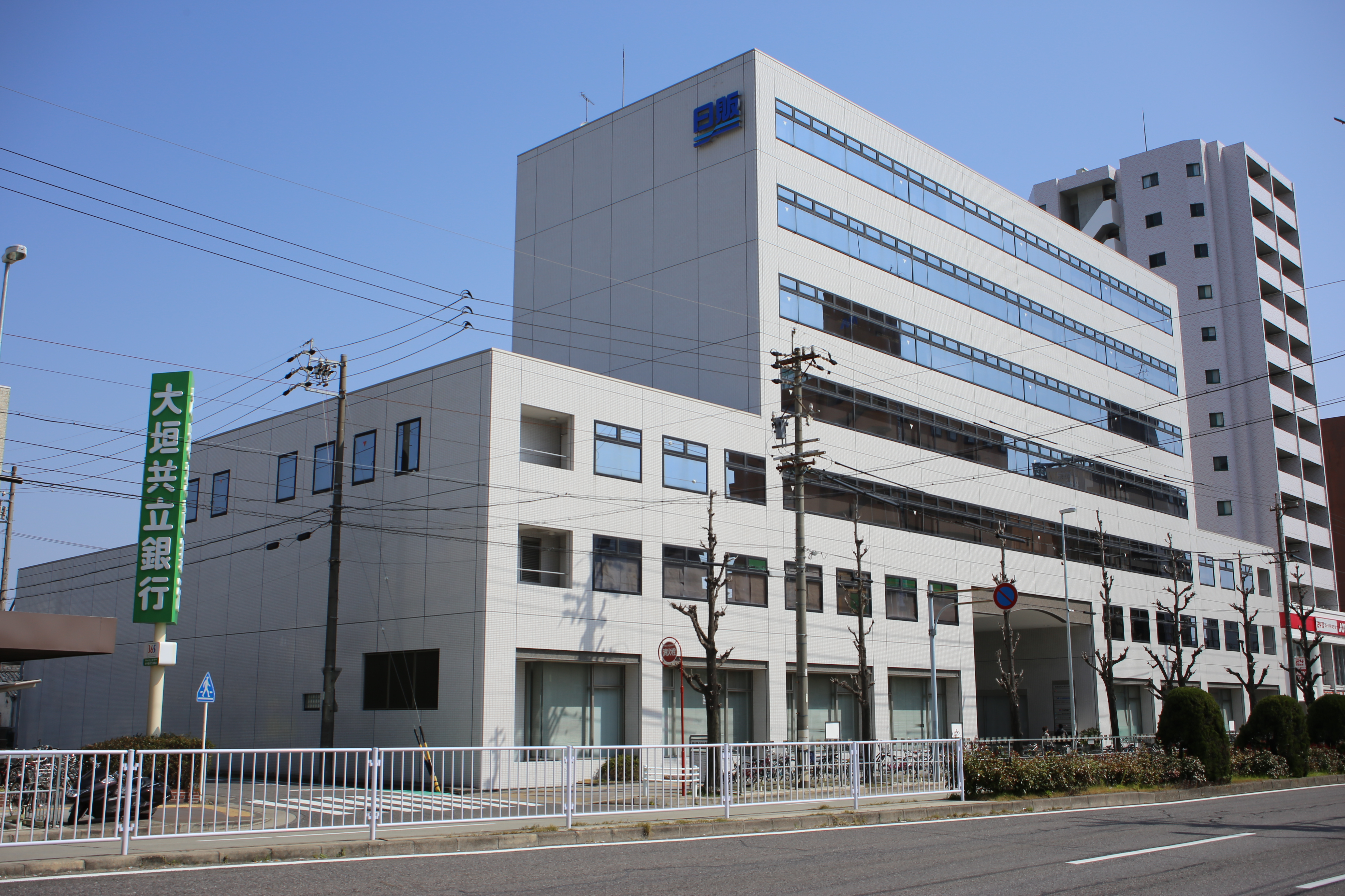 名古屋市北区城見通3丁目の日販名古屋ビルを南側公道西側より撮影